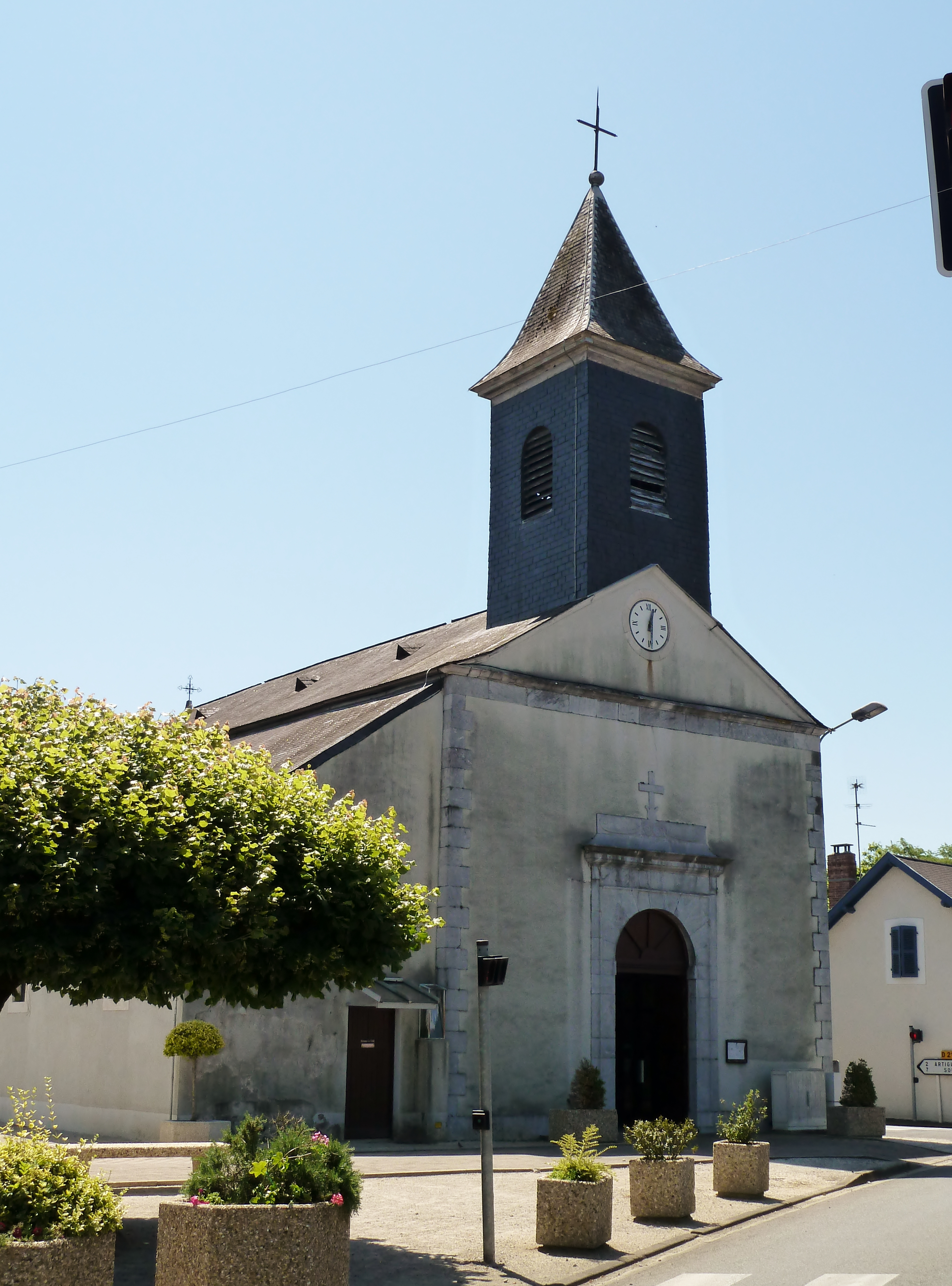 Ousse, France